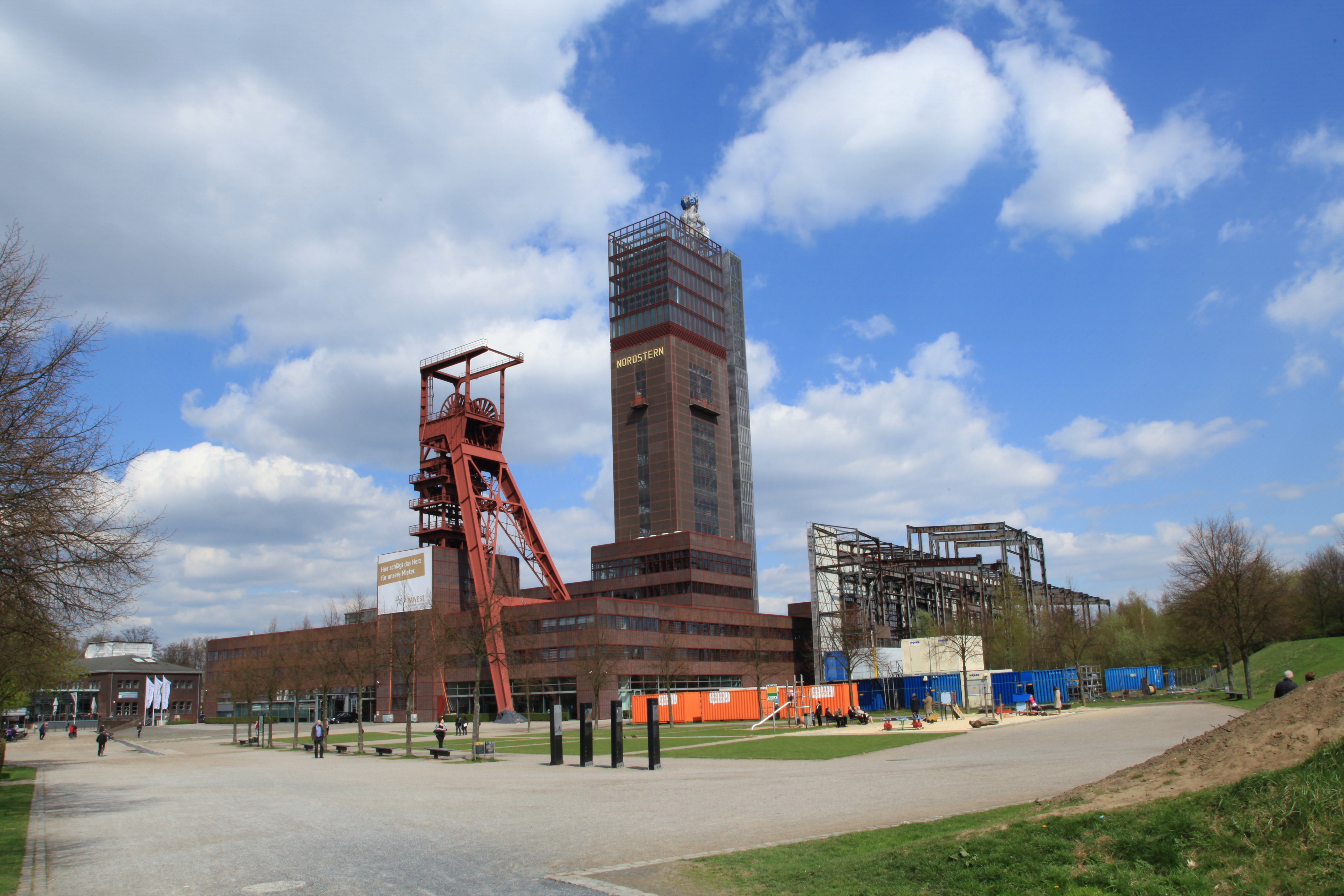 Zeche Nordstern am Nordsternplatz im Nordsternpark in Gelsenkirchen